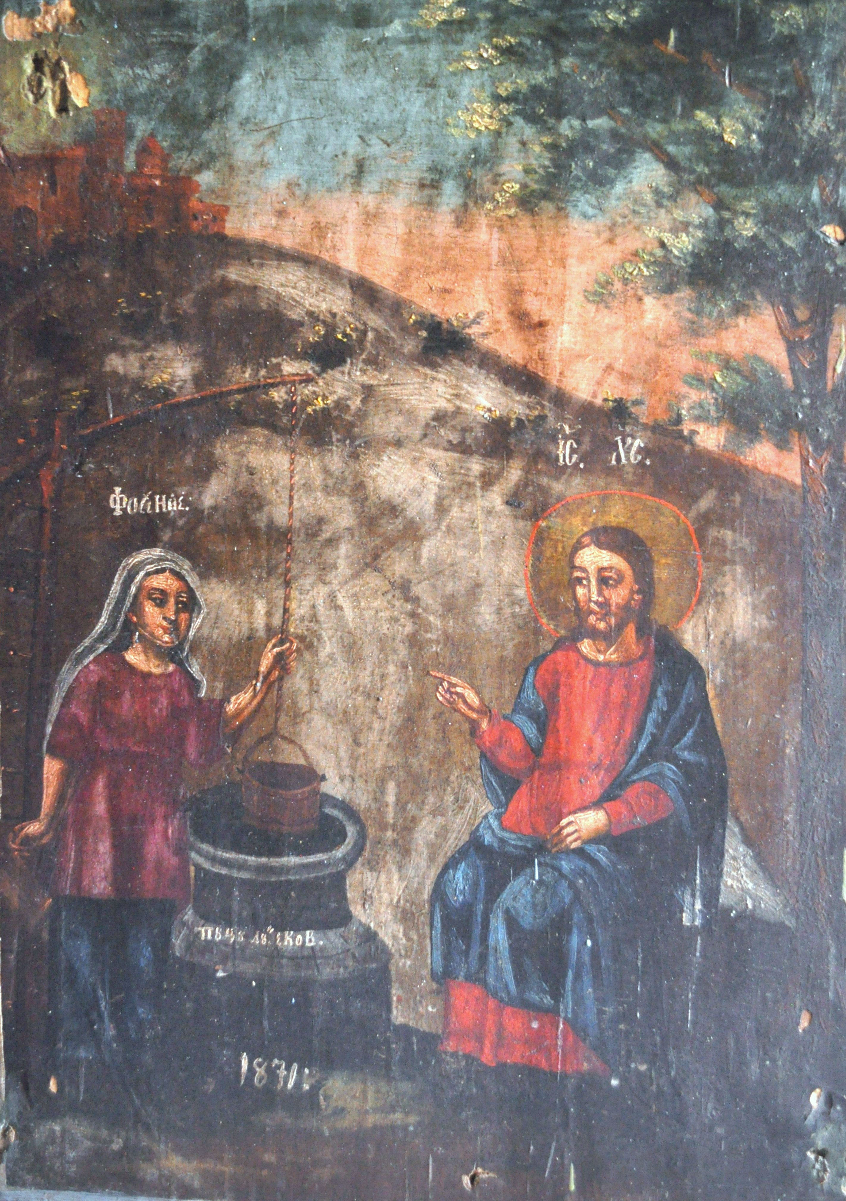 Biserica de lemn „Cuvioasa Paraschiva” din satul Valea Sării, județul Vrancea